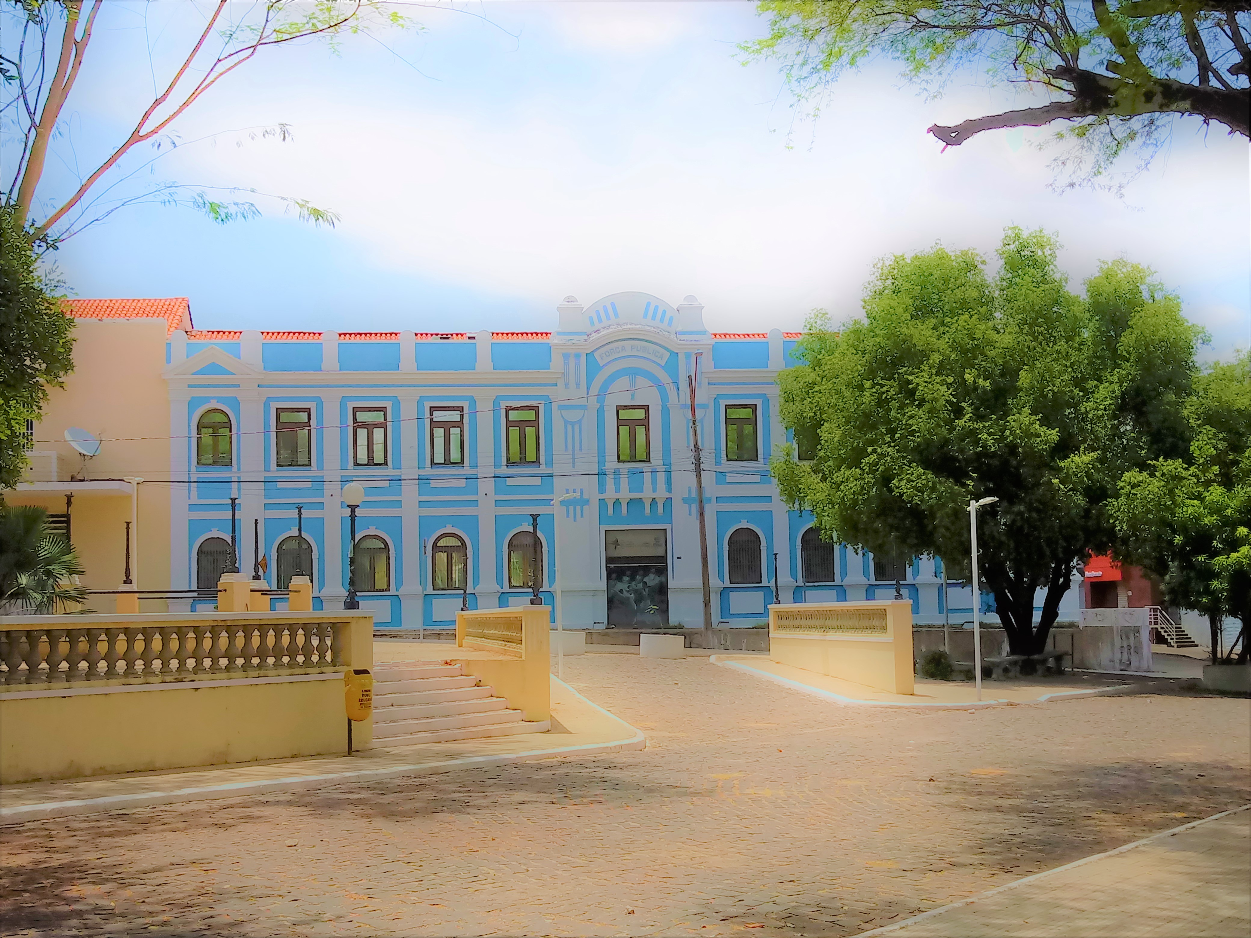 Palacete da artesanato no Piauí- Mestre Dezinho. Antigo quartel do Comando Geral da Força Pública do Piauí, atual Polícia Miliar do Estado do Piauí.